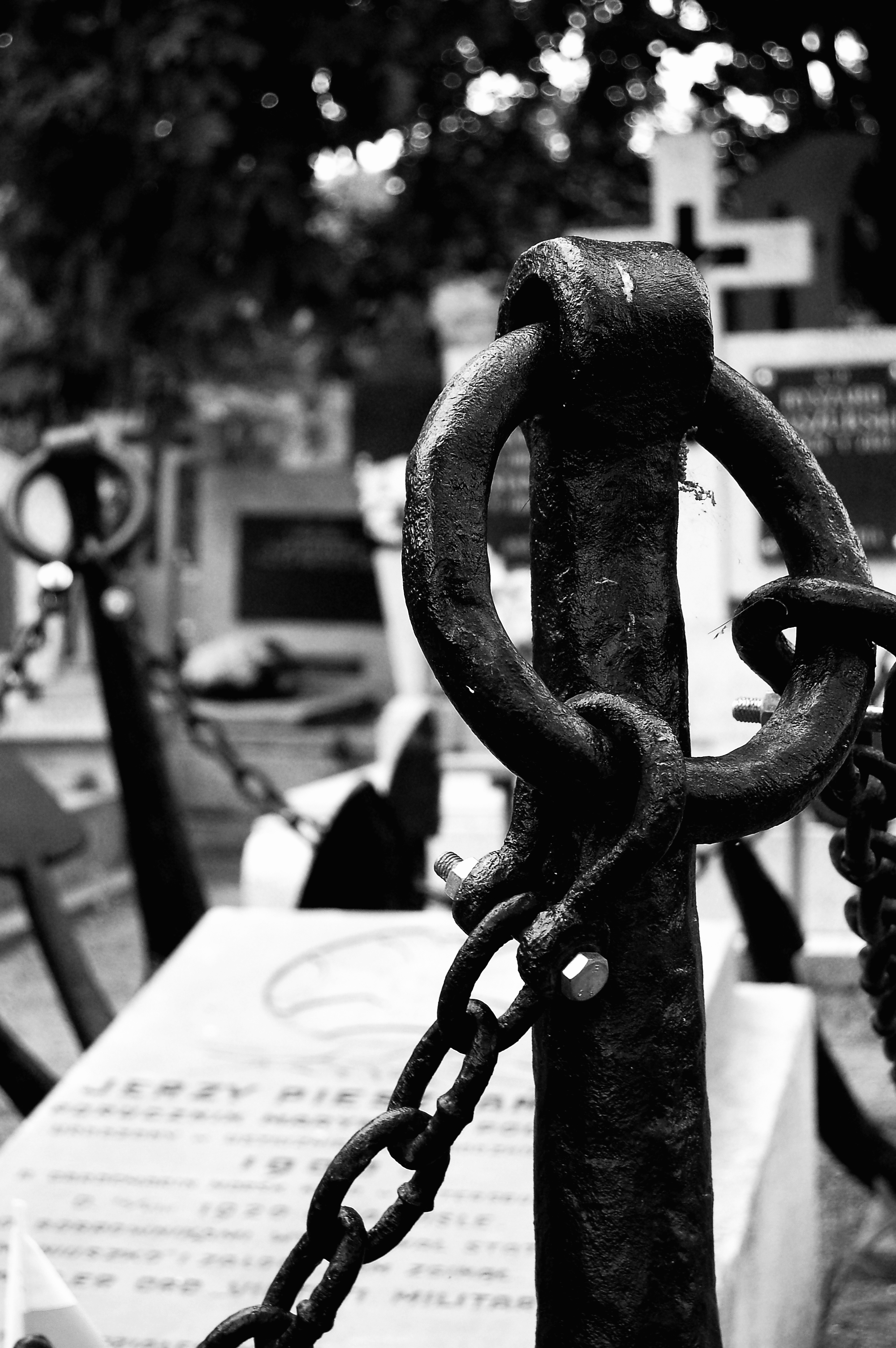 Cmentarz Komunalny we Włocławku